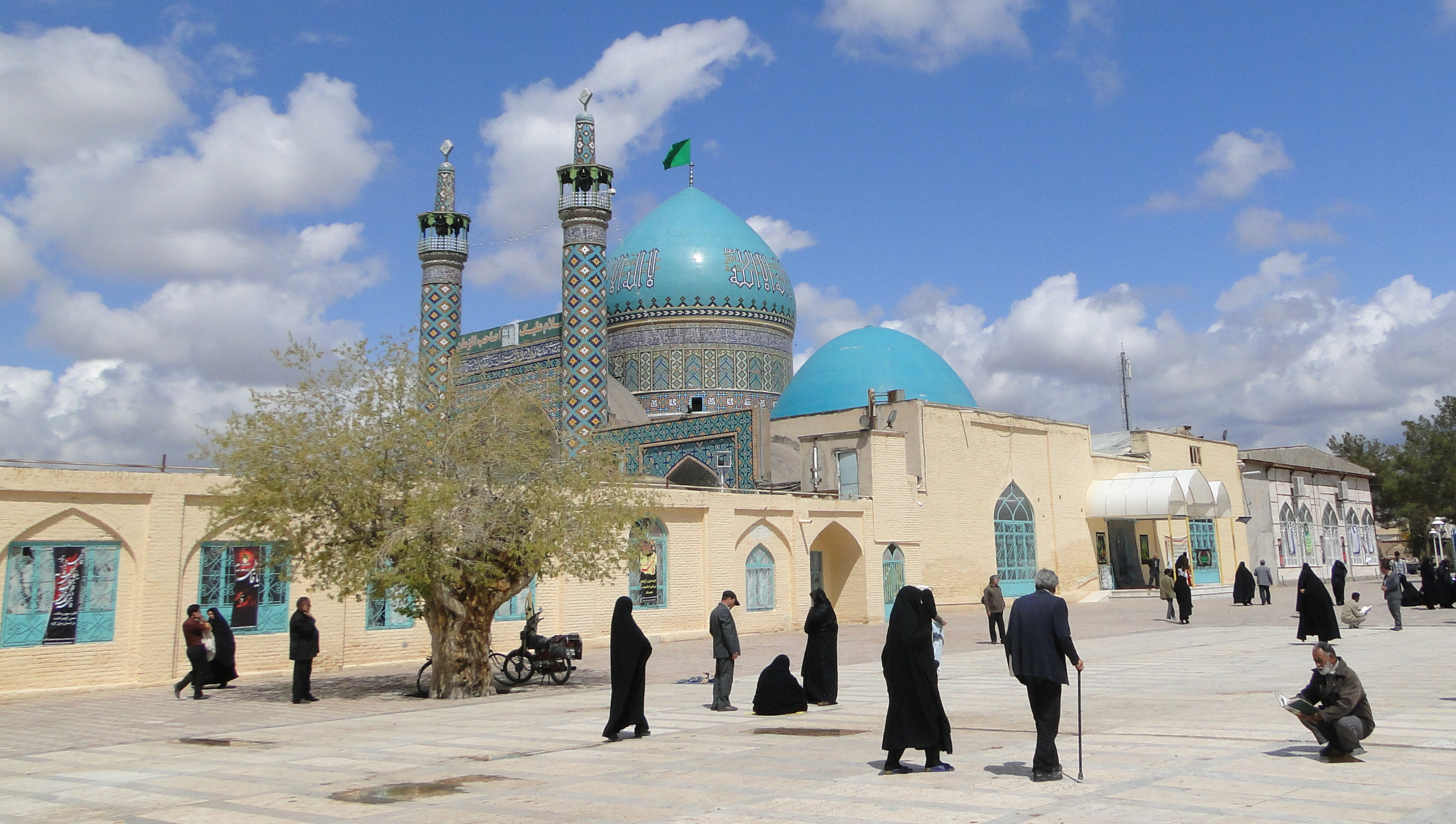 kashmar